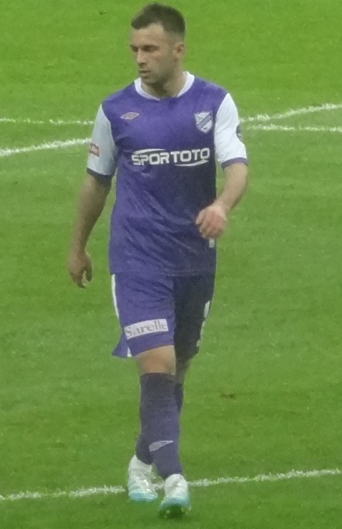 Hakan G.Saray maçında